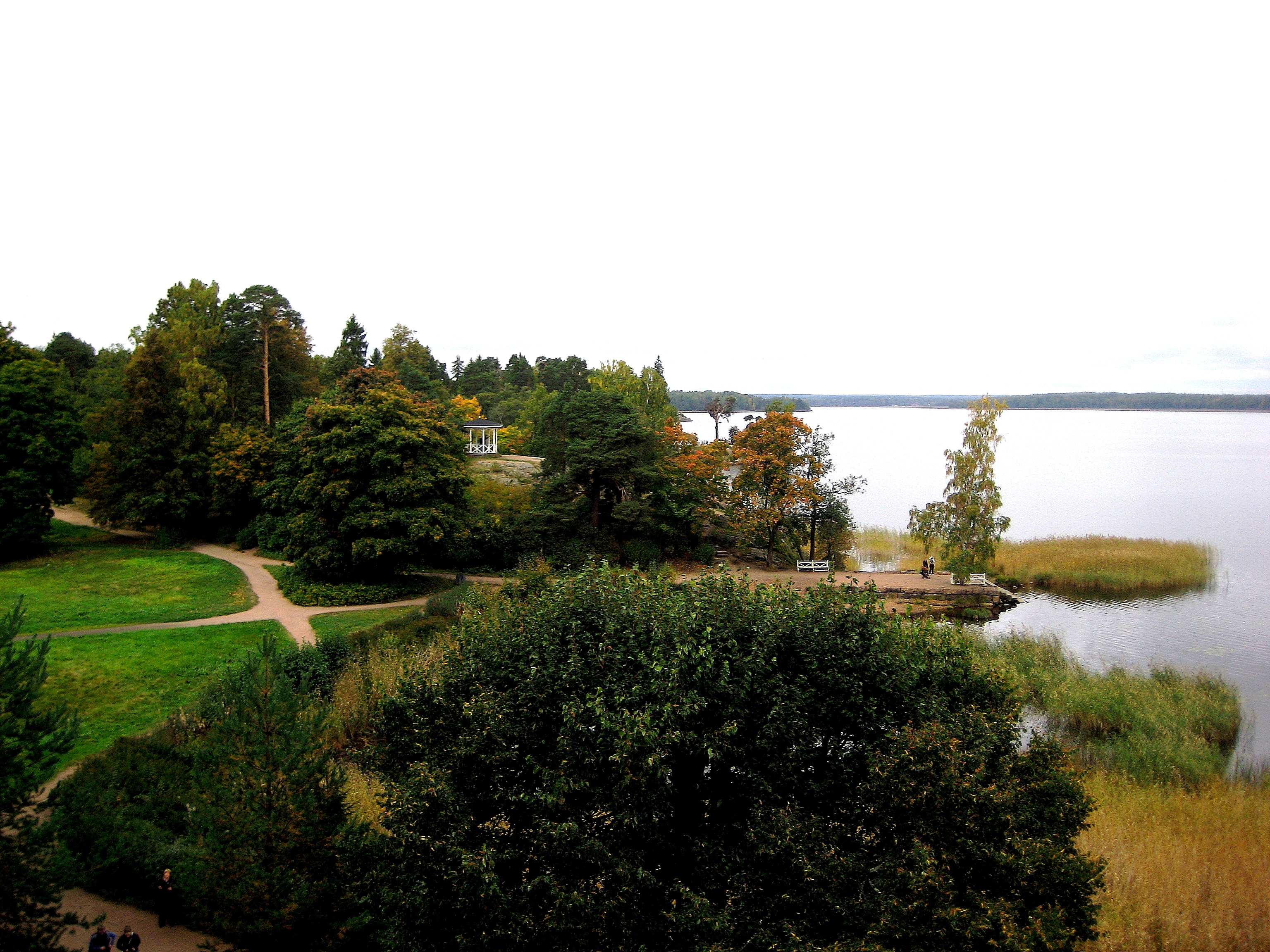 Выборг. Парк Монрепо.